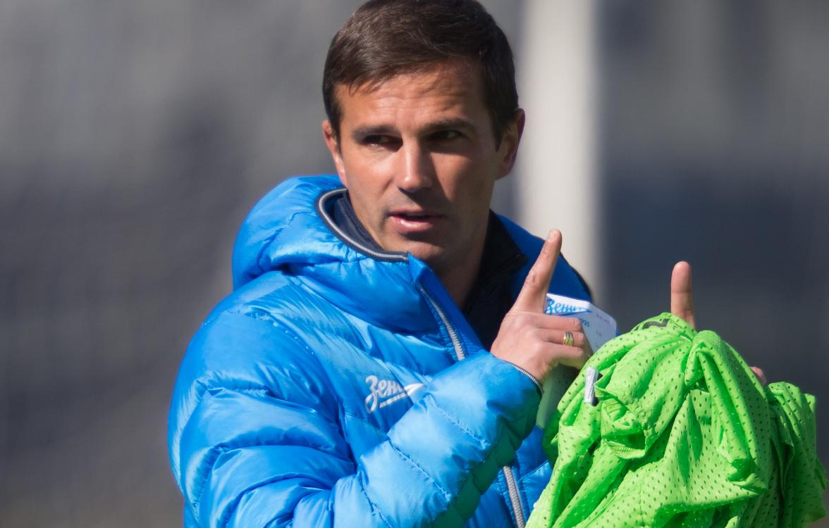 В Зените в 2015 году